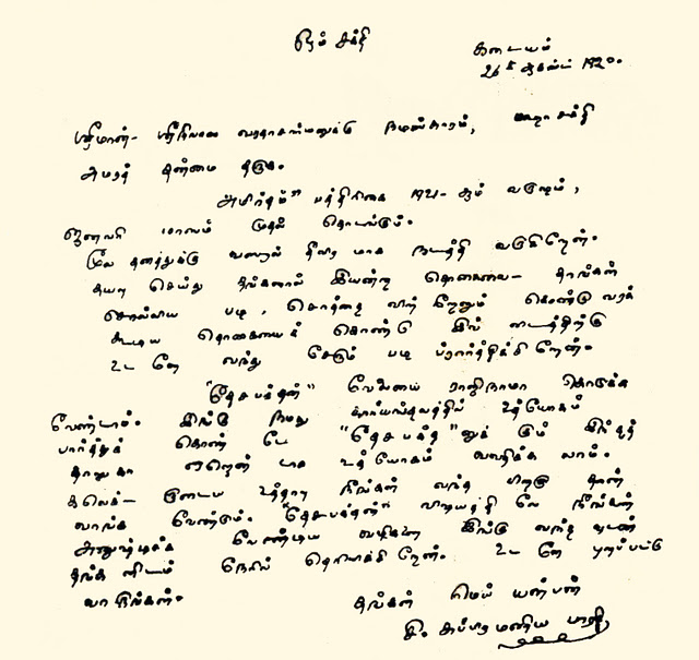 பாரதி